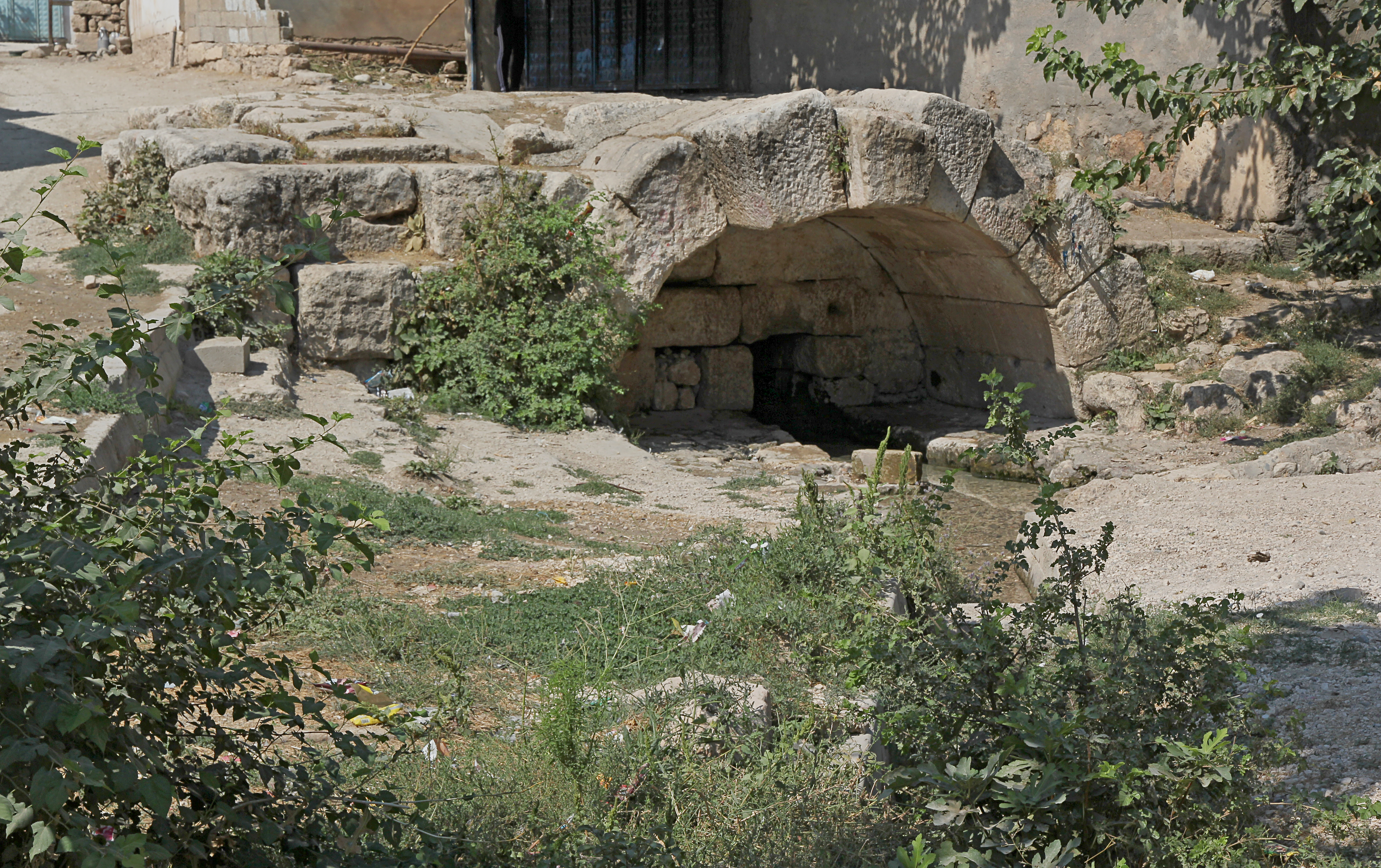 Römischer Brunnen in Perrhe/Pirin, Adıyaman, Türkei